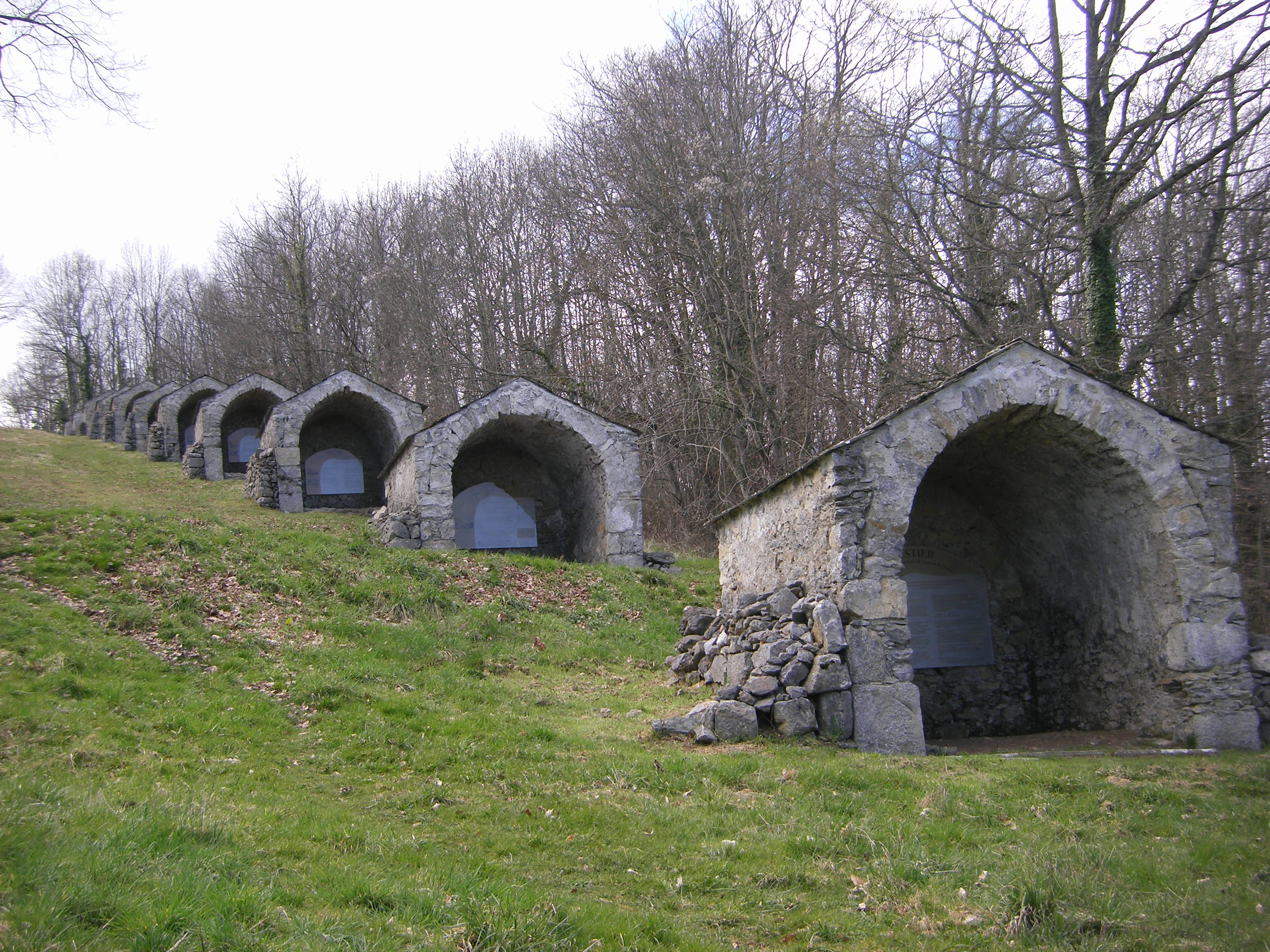 Nestier est un petit village du canton de Saint-Laurent-de-Neste. Il abrite sur une colline nommée Mont Arès un calvaire très original. Le Mont Arès est un ancien lieu de culte païen (comme beaucoup d'autres dans les Pyrénées). Onze oratoires de pierre et chaux ont été bâtis à cet endroit, selon les techniques paysannes locales, vers 1855-1860. Chaque petite chapelle comporte un panneau explicatif très bien fait (textes, anciennes photos, historique...). Au sommet de la colline se trouve la « chapelle haute », qui date de 1863 (elle avait remplacé une croix).